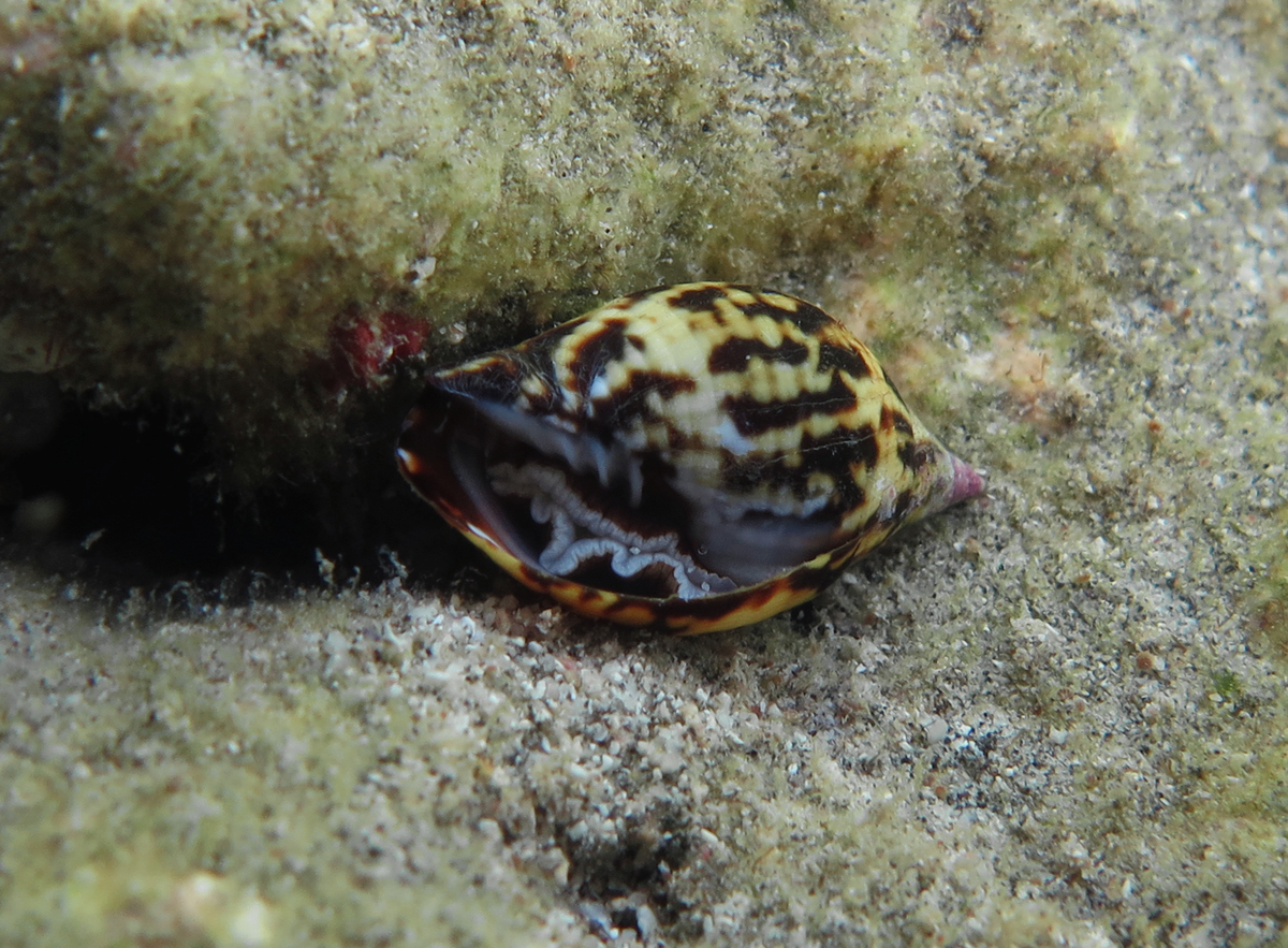 Strigatella litterata (ex-Mitra litterata) à la Réunion.